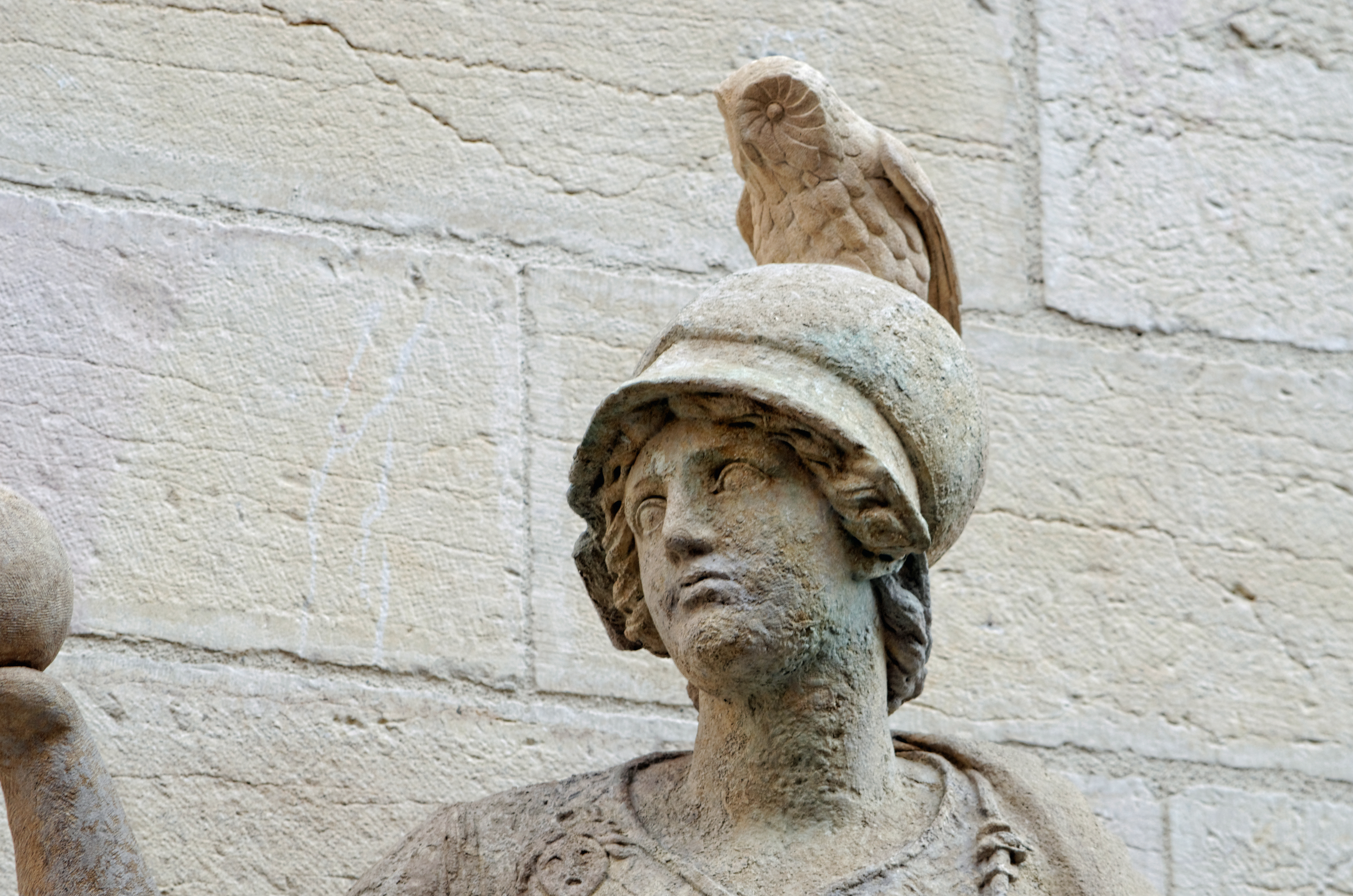 Détail de la statue de Minerve, après restauration, à côté du tympan de la porte centrale de l'hôtel du Commandant militaire, 41 rue Vannerie à Dijon.